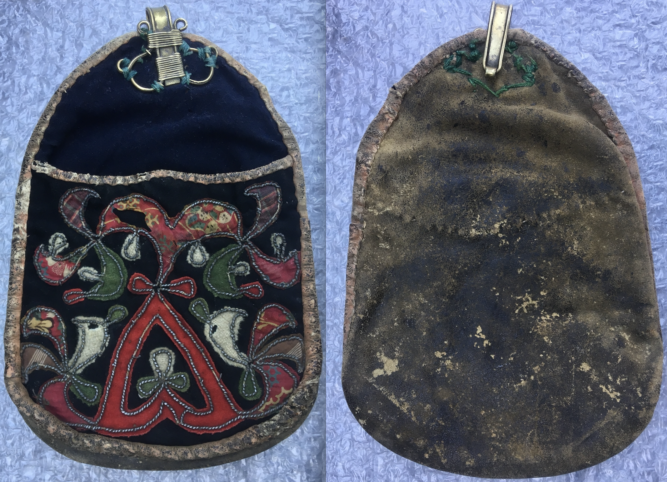 Tenntrådsbroderad kjolsäck från Svärdsjö socken.